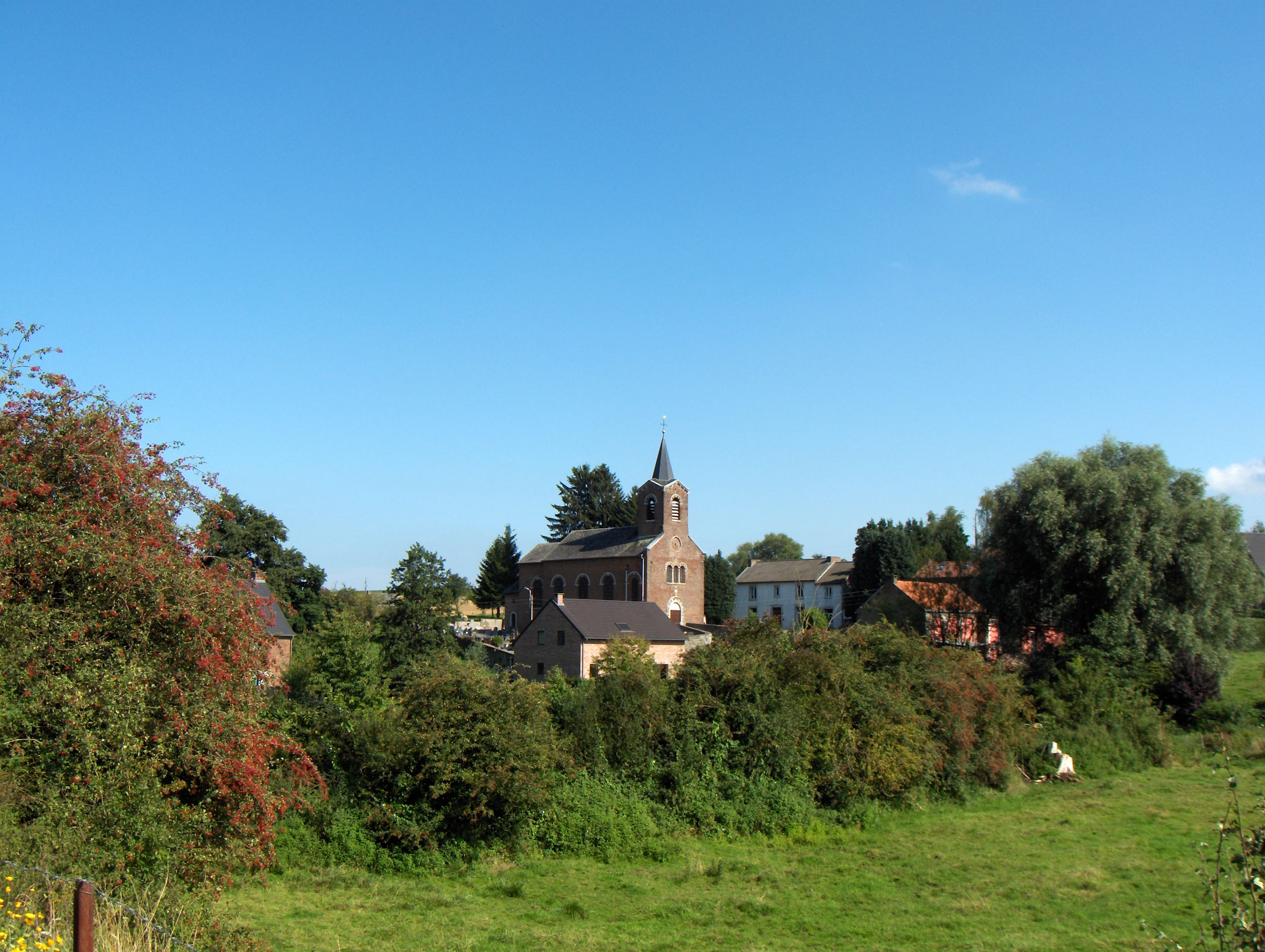 Warnant-Dreye (Ortsteil der Gemeinde Villers-le-Bouillet, Prov. Lüttich, Belgien), Dorfkirche von Dreye aus 1851. Architekt: H. Dejardin.